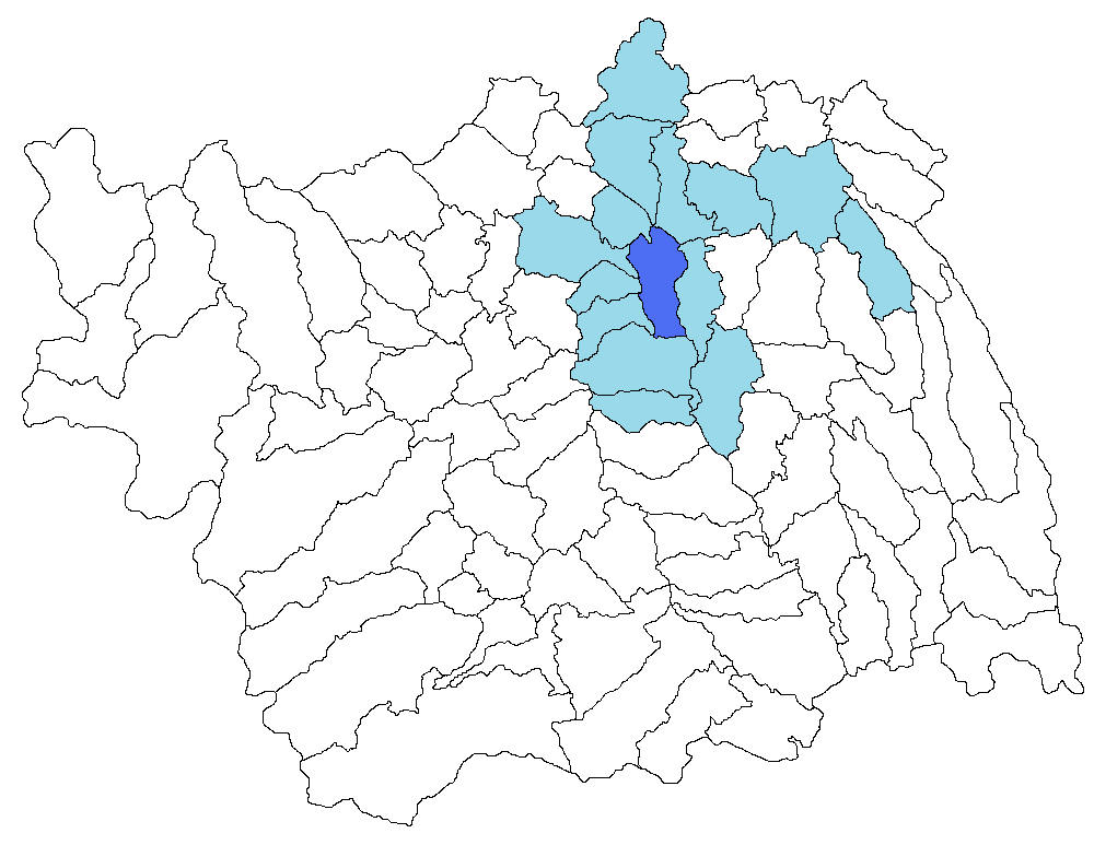 Zona metropolitana Bacau.